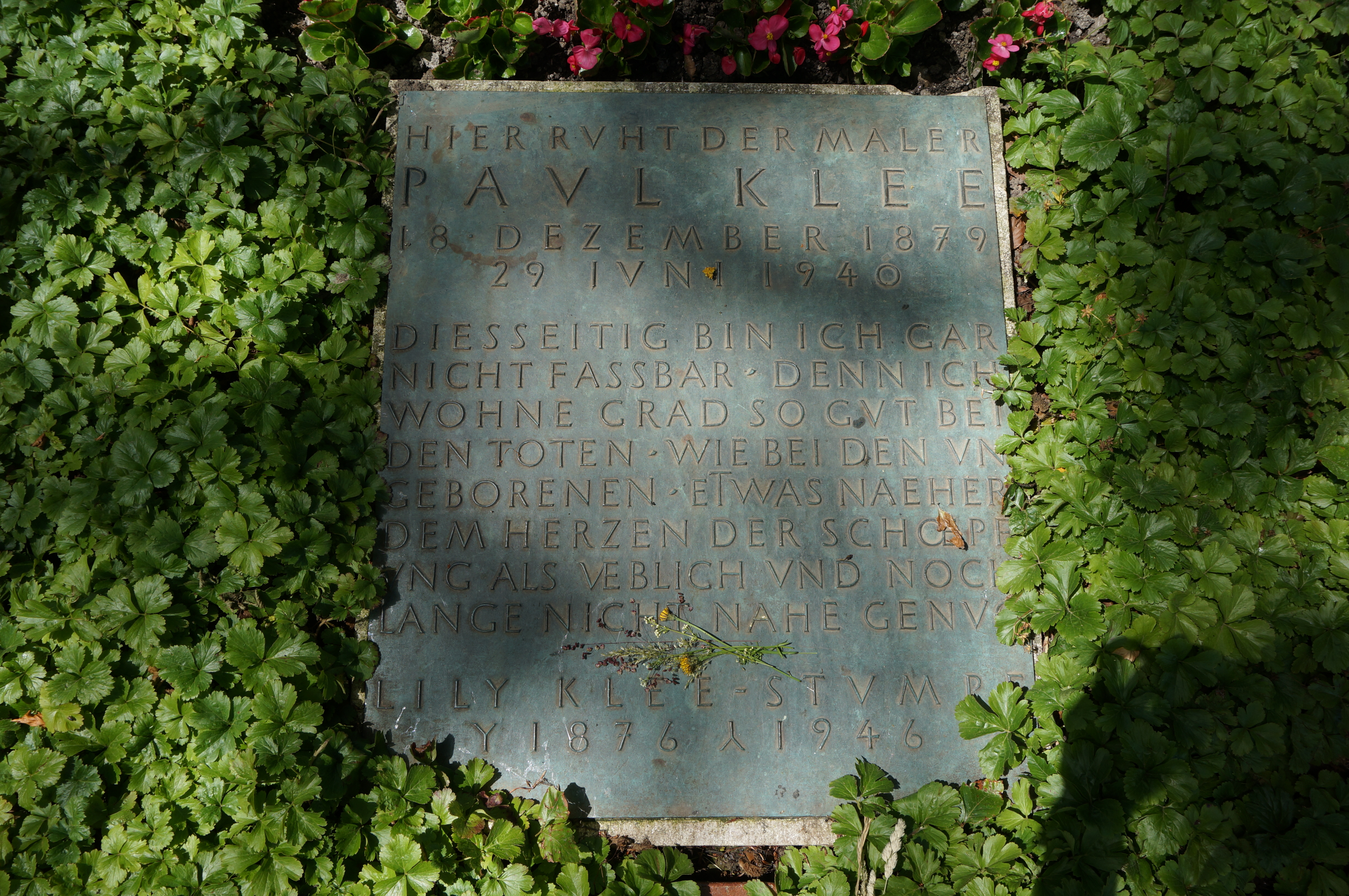 Bern Schosshaldenfriedhof Grabstein Paul Klee